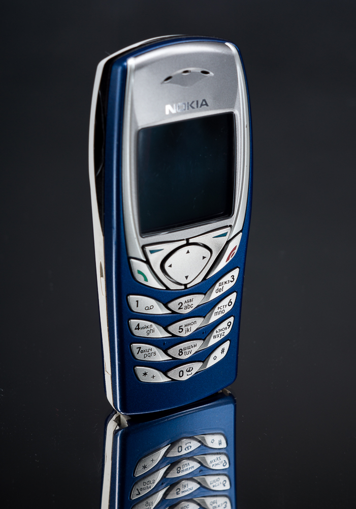 Nokia 6100